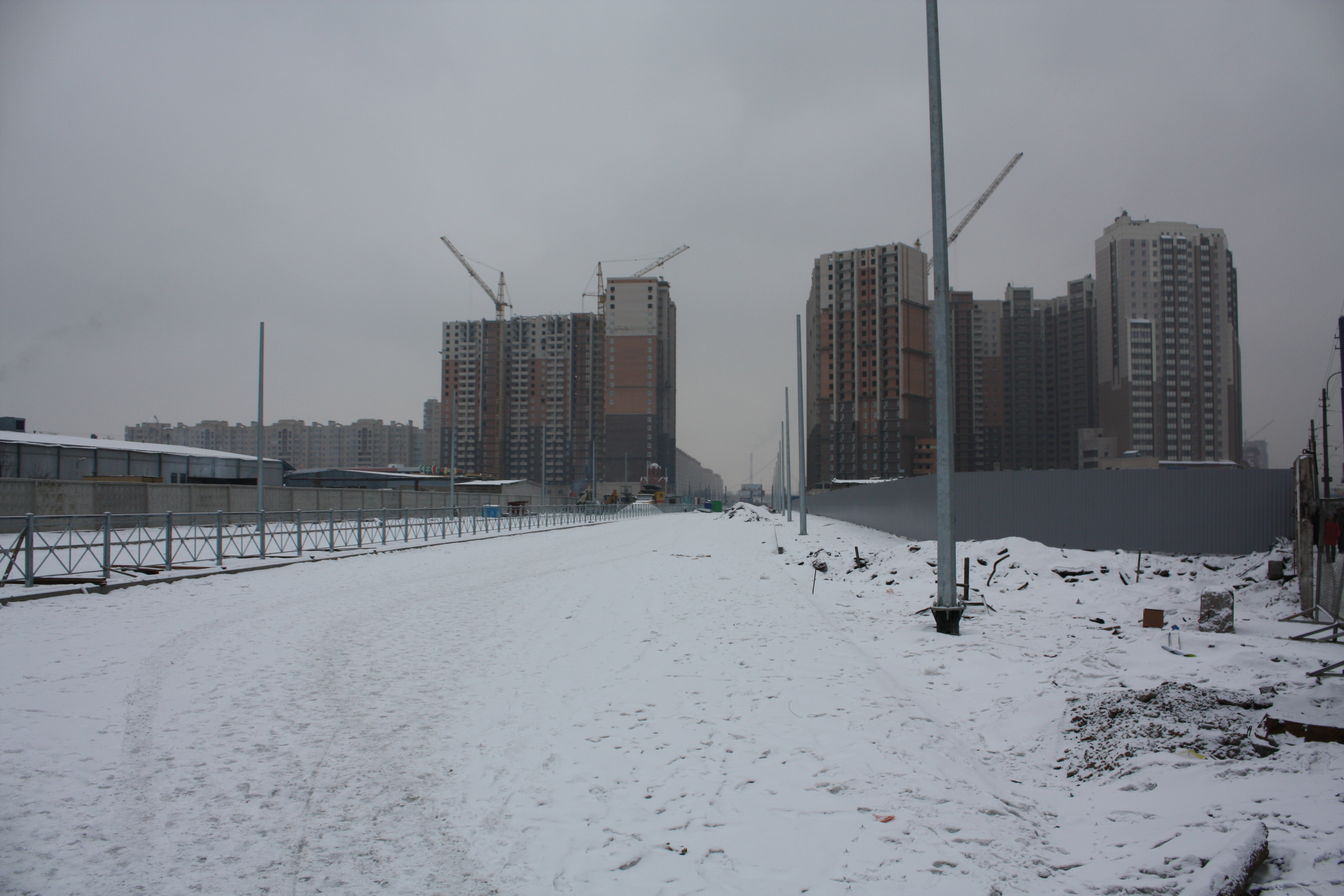 Работы по соединению Богатырского проспекта со Светлановской площадью. СПб